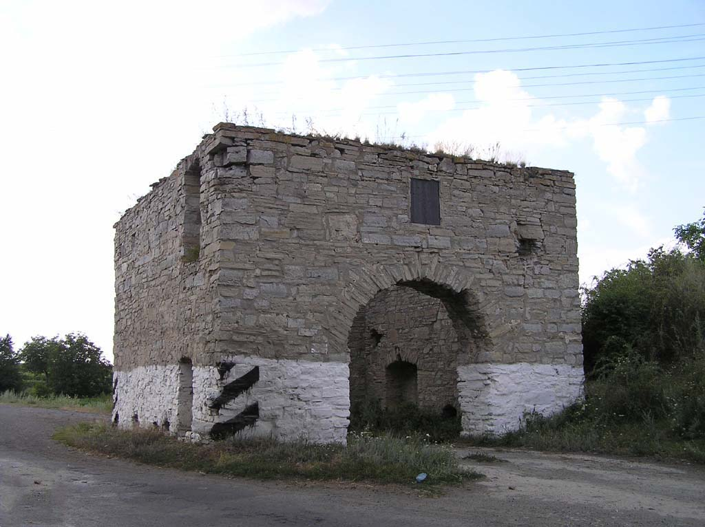 Okopy Świętej Trójcy - Brama Lwowska